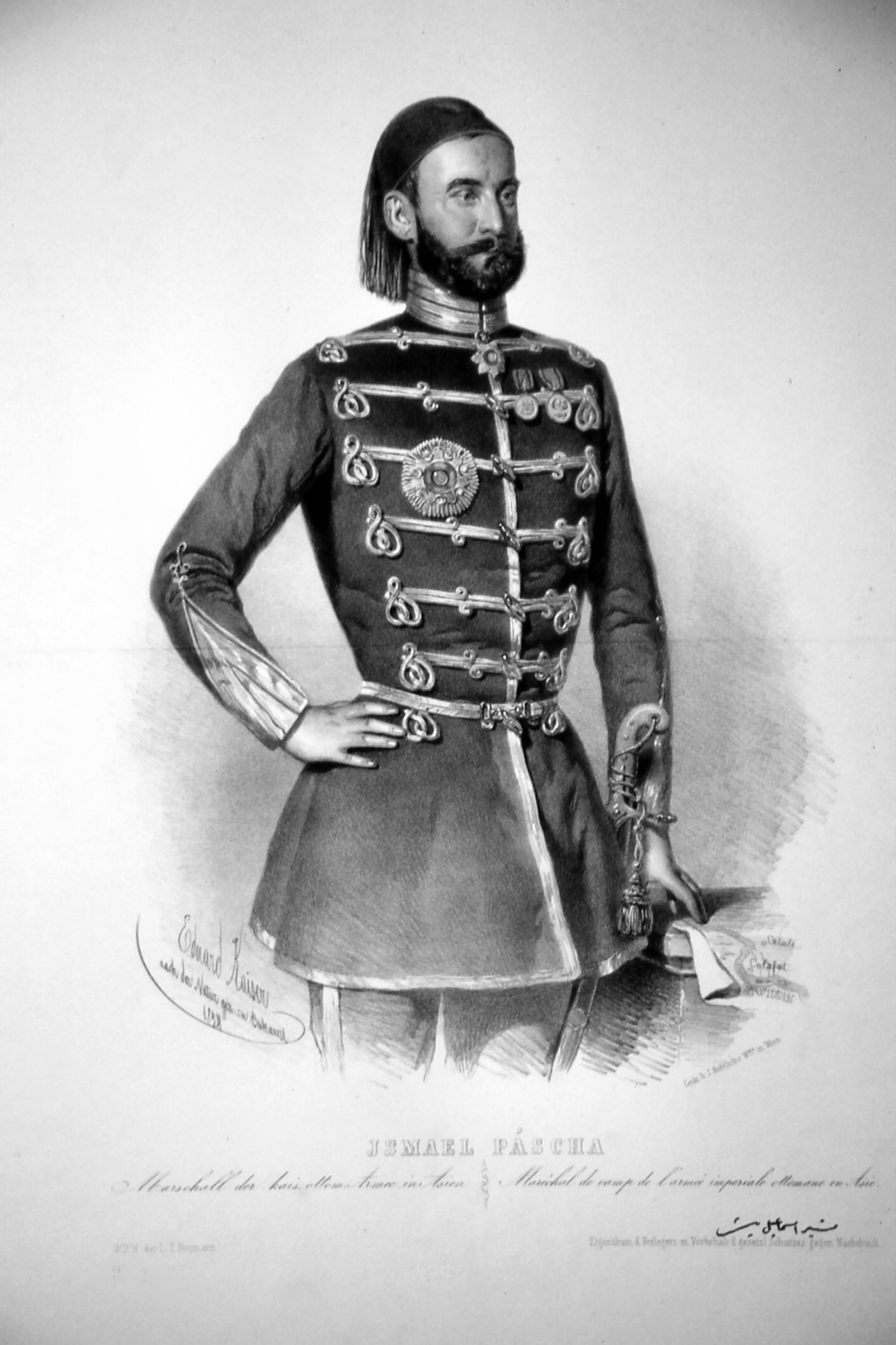 Georg Kmety (1813-1865), ungarischer Revolutionsgeneral, spätr als Ismail Pascha türkischer General. Lithographie von Eduard Kaiser, 1864